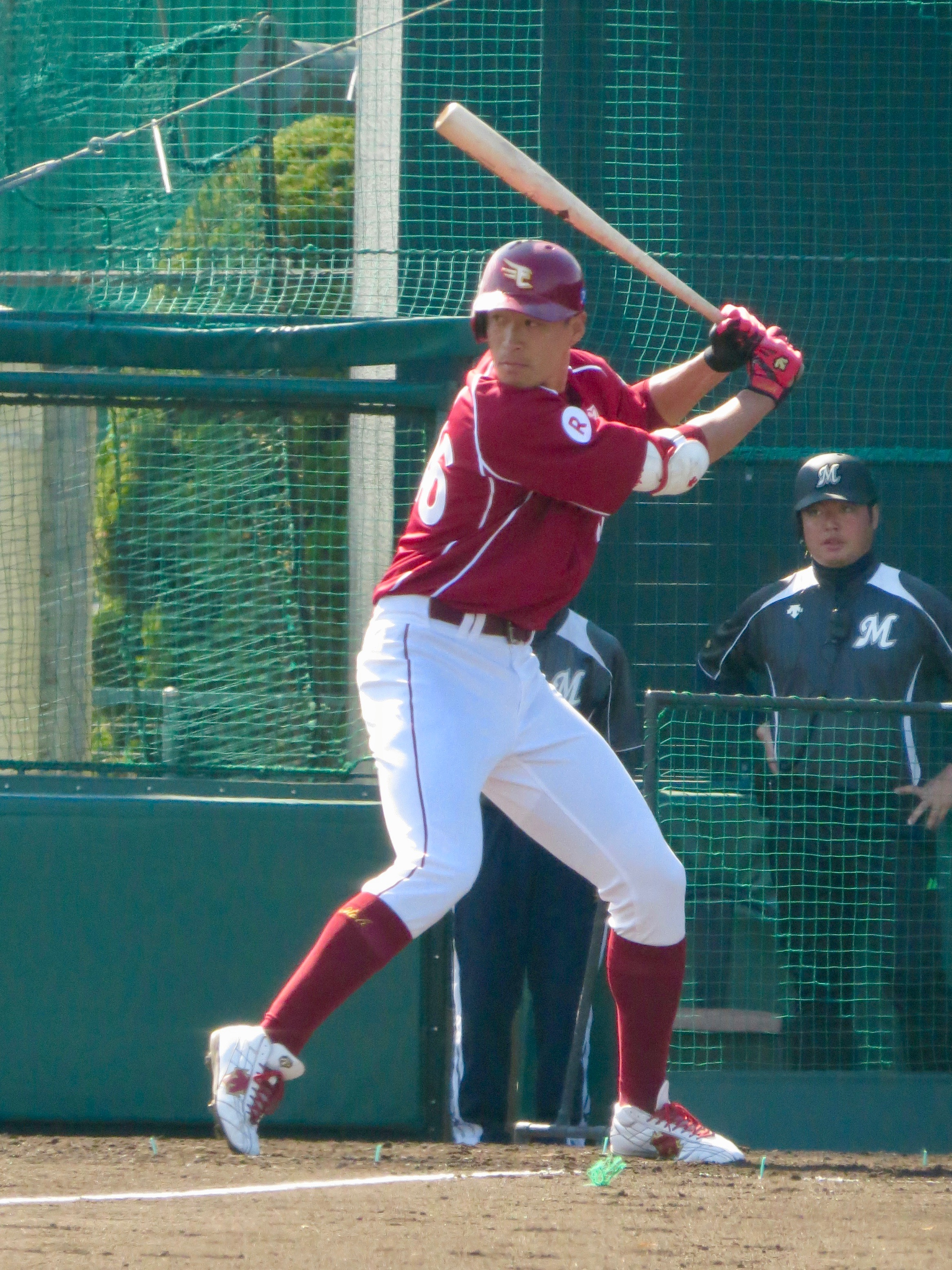 東北楽天ゴールデンイーグルス内野手の伊東亮大。ロッテ浦和球場にて。